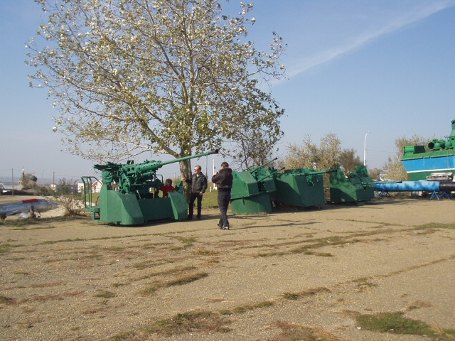 г.Темрюк. Орудия времён Великой Отечественной войны